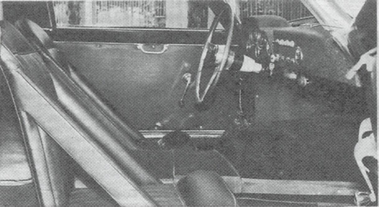 Foto degli interni della Bandini 1000 GT tratta dal libro Bandini